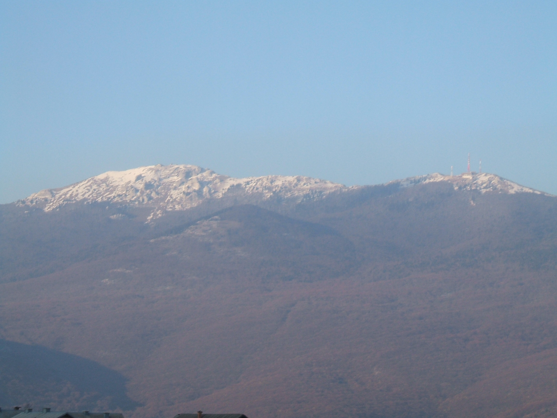 A likai Plješevica/Lička Plješivica havas csúcsa Horvátországban